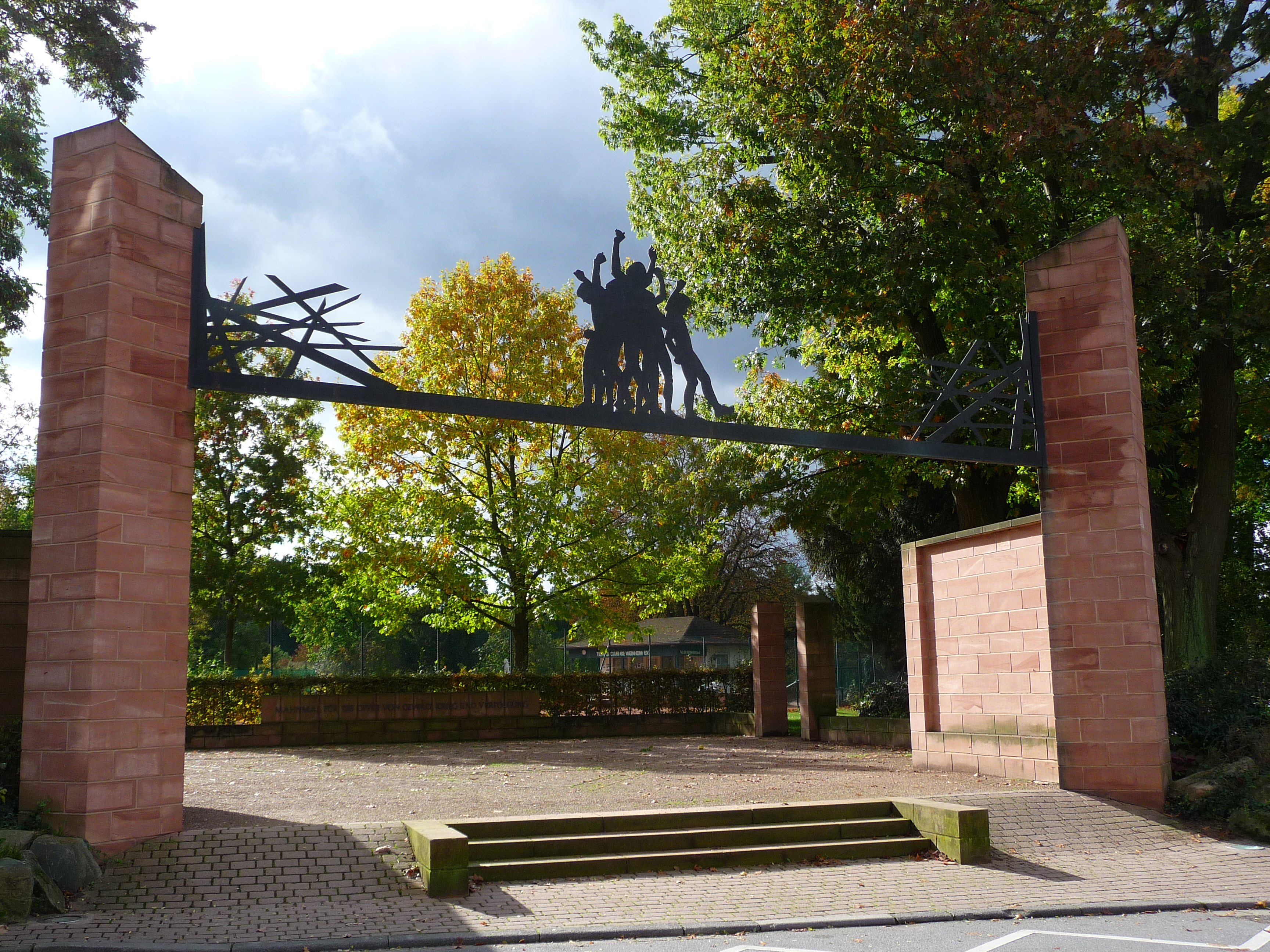 Das 1999 aus rotem Odenwälder Sandstein errichtete Mahnmal für die Opfer von Gewalt, Krieg und Verfolgung in Weinheim (Rhein-Neckar-Kreis, Baden-Württemberg, Deutschland).